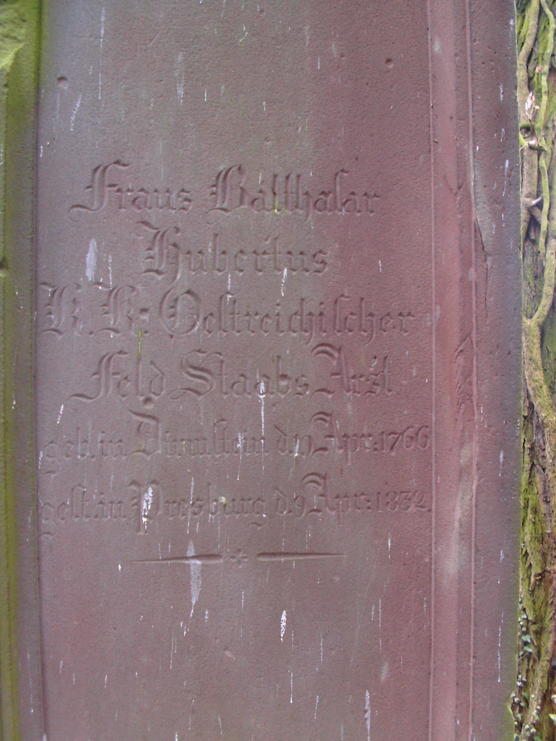 Grabinschrift Dr. Franz Balthasar Hubertus, Bruder von Johann Hubertus